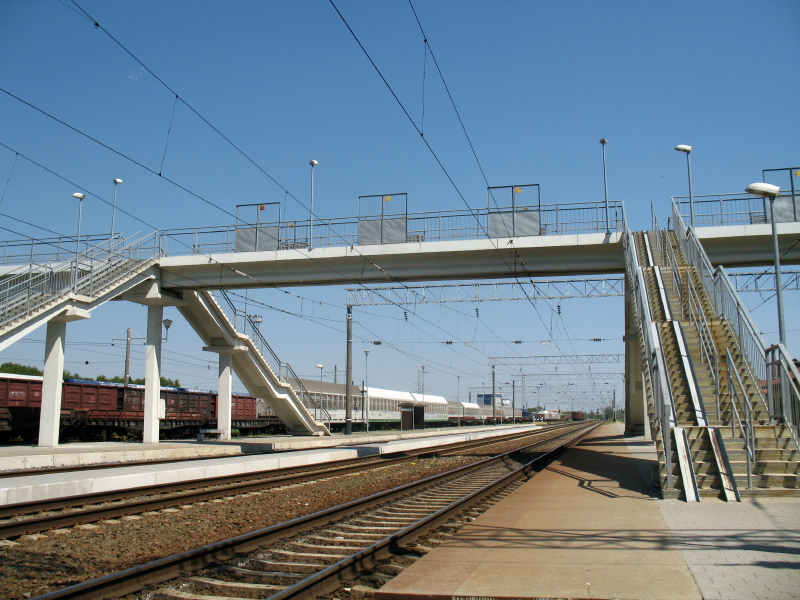 Palemono geležinkelio stotis, Kaunas.